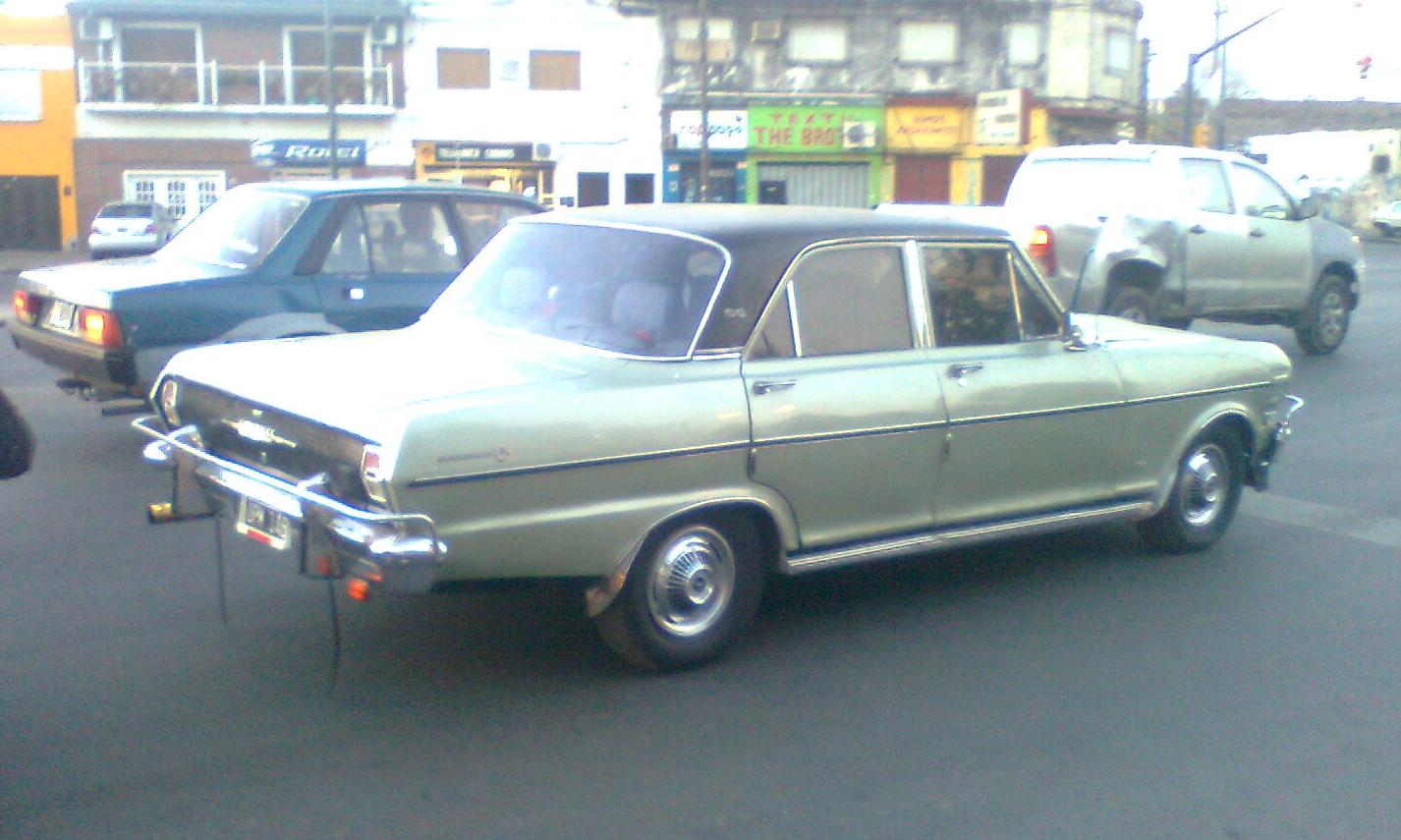 Versión SS del Chevrolet 400, incluyendo adornos, techo vinílico y otras terminaciones